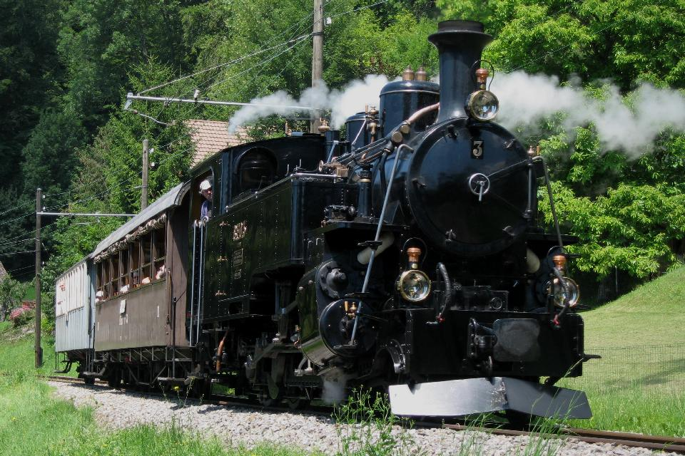 Bergwärts fahrender Zug der Museumsbahn Blonay–Chamby (BC) auf der Bahnstrecke Blonay–Chamby zwischen Blonay und der Haltestelle Chantemerle. Der Zug bestehend aus der Dampflokomotive HG 3/4 3 mit gemischtem Adhäsions- und Zahnradantrieb der ehemaligen Brig–Furka–Disentis-Bahn (BFD), dem Sommerwagen C4 44 der Berner Oberland-Bahnen (BOB) und dem Personenwagen BC4 22 der Montreux–Berner Oberland-Bahn (MOB).